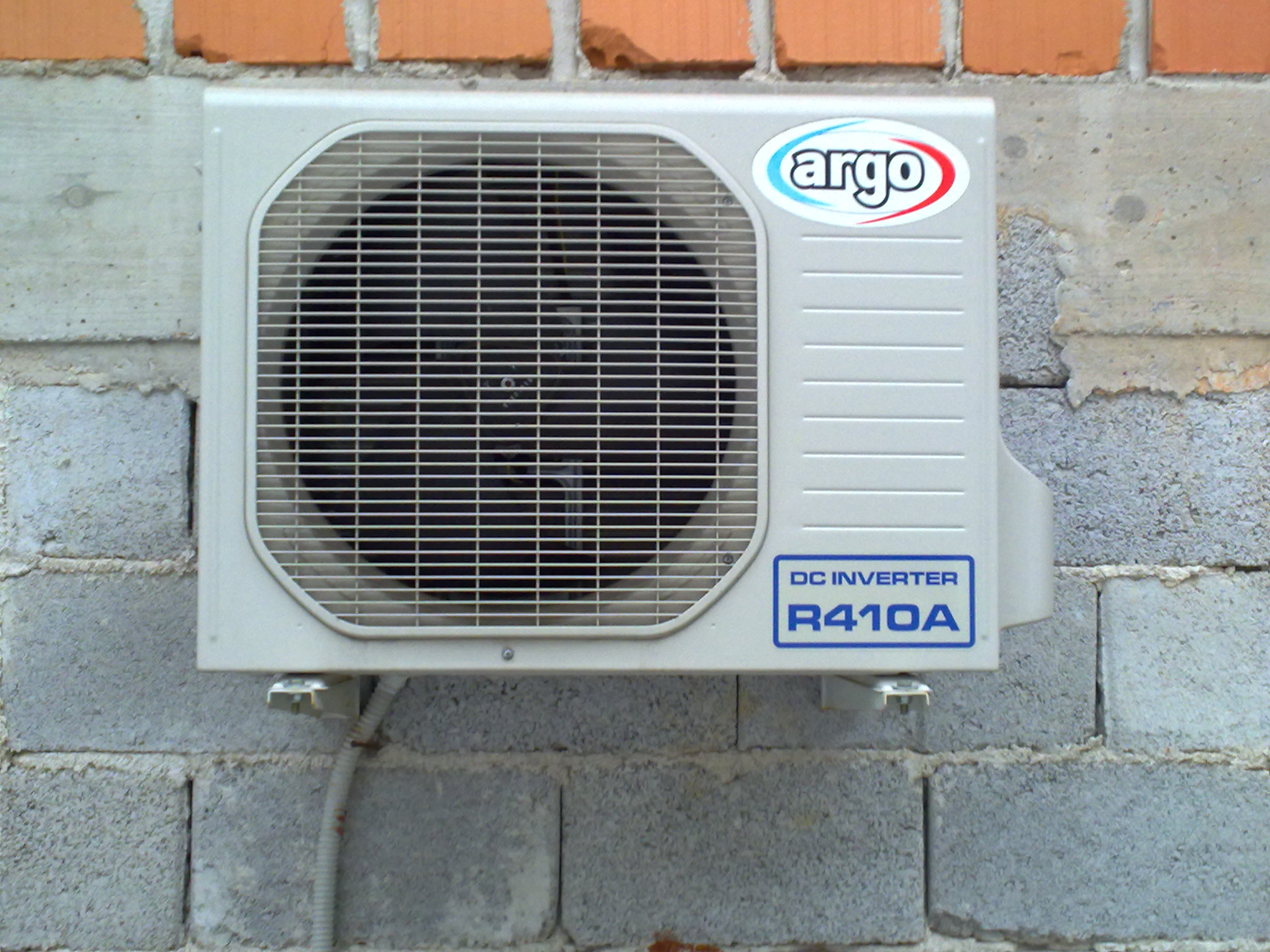 Zunanja enota klima naprave Split sistema, ki uporablja R410A za hlajenje